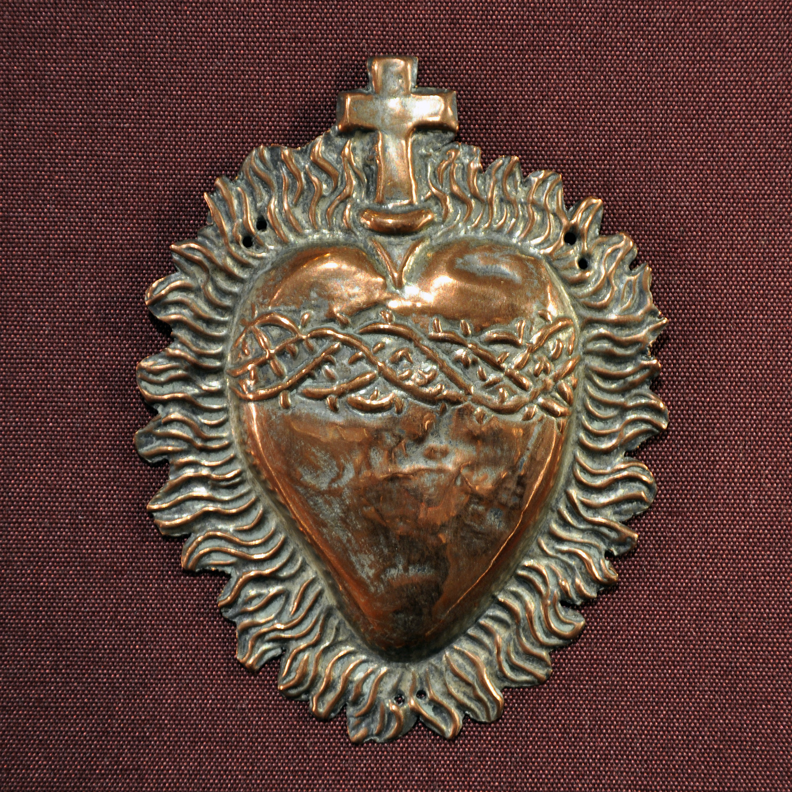 Ex-voto, cuivre, XIXème siècle. Musée du Coeur ( collection du docteur Boyadjian et de son épouse ), MRAH, Parc du Cinquantenaire, Bruxelles.